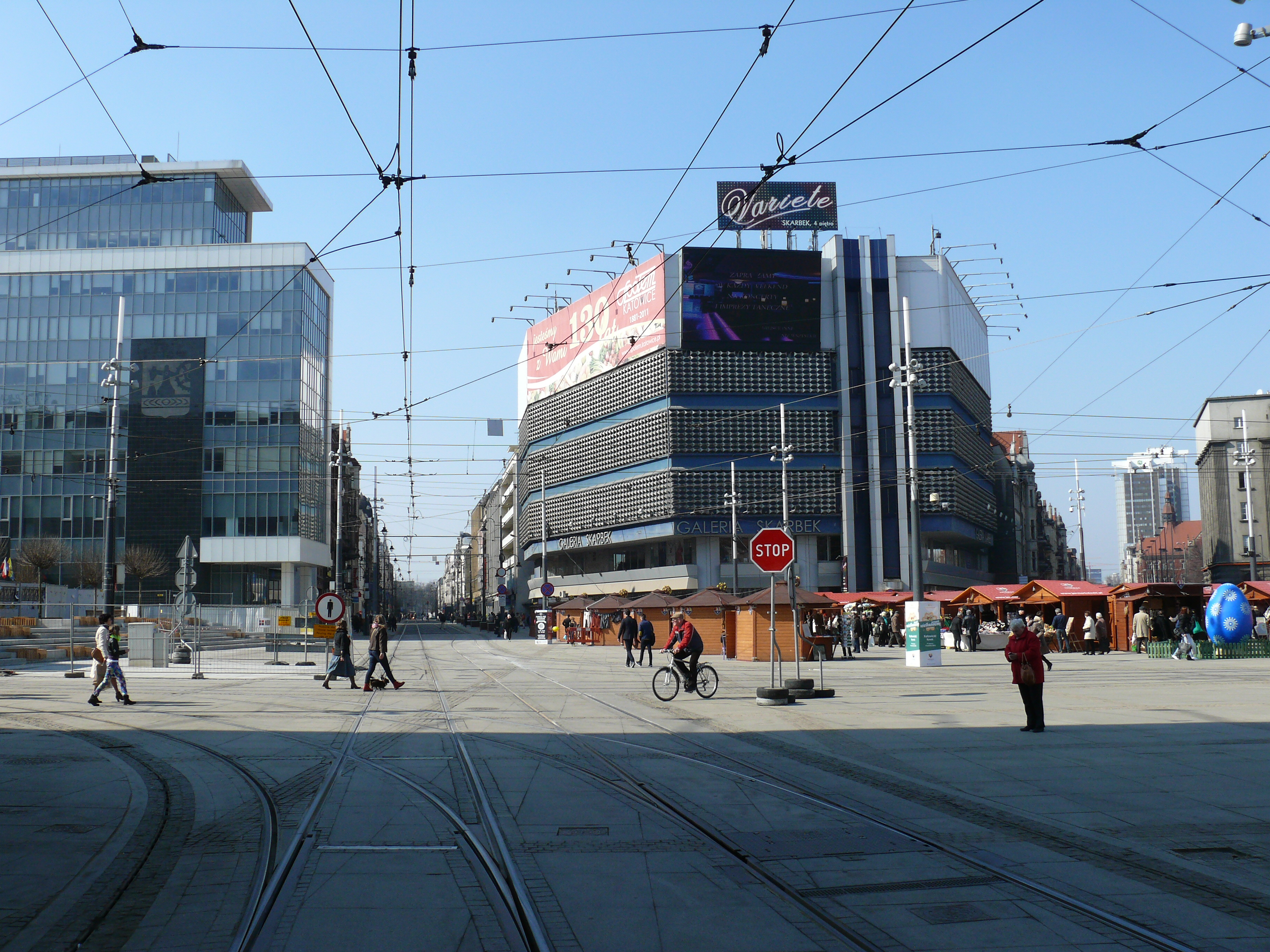 Blick auf den westlichen Teil des Rynek in Kattowitz, mit der Galeria Skarbek in der Bildmitte. Links davon die Ulica 3 Maja, rechts die Ulica Adama Mickiewicza mit den Stalexport-Türmen am Ende.